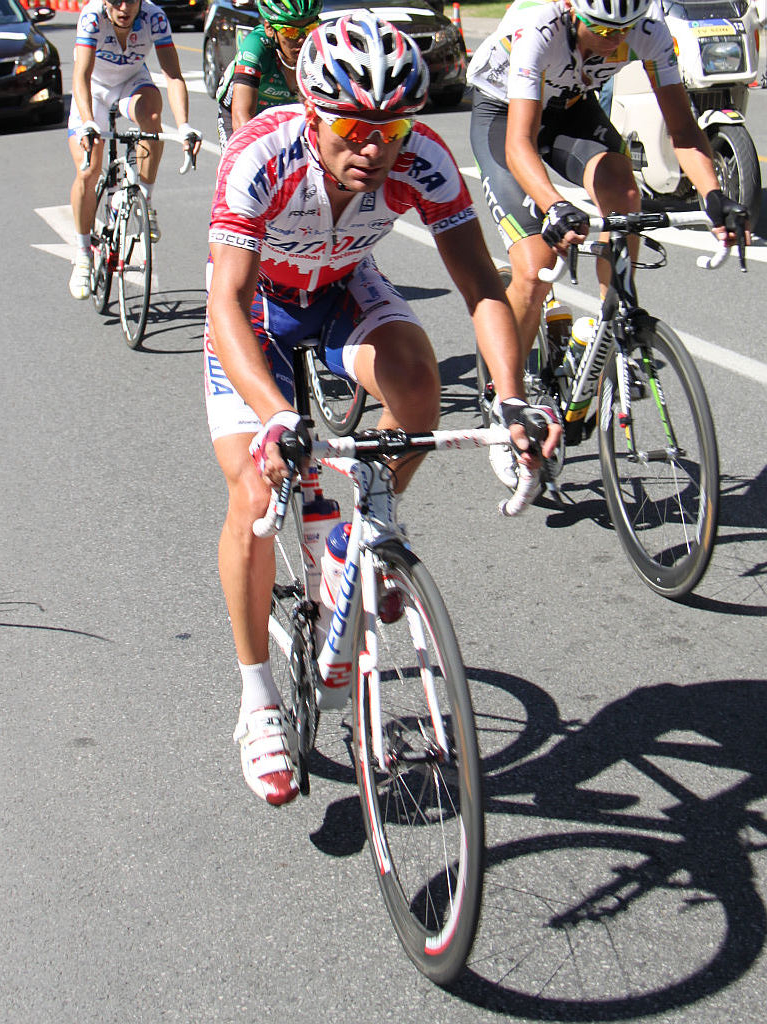 Danilo DiLuca